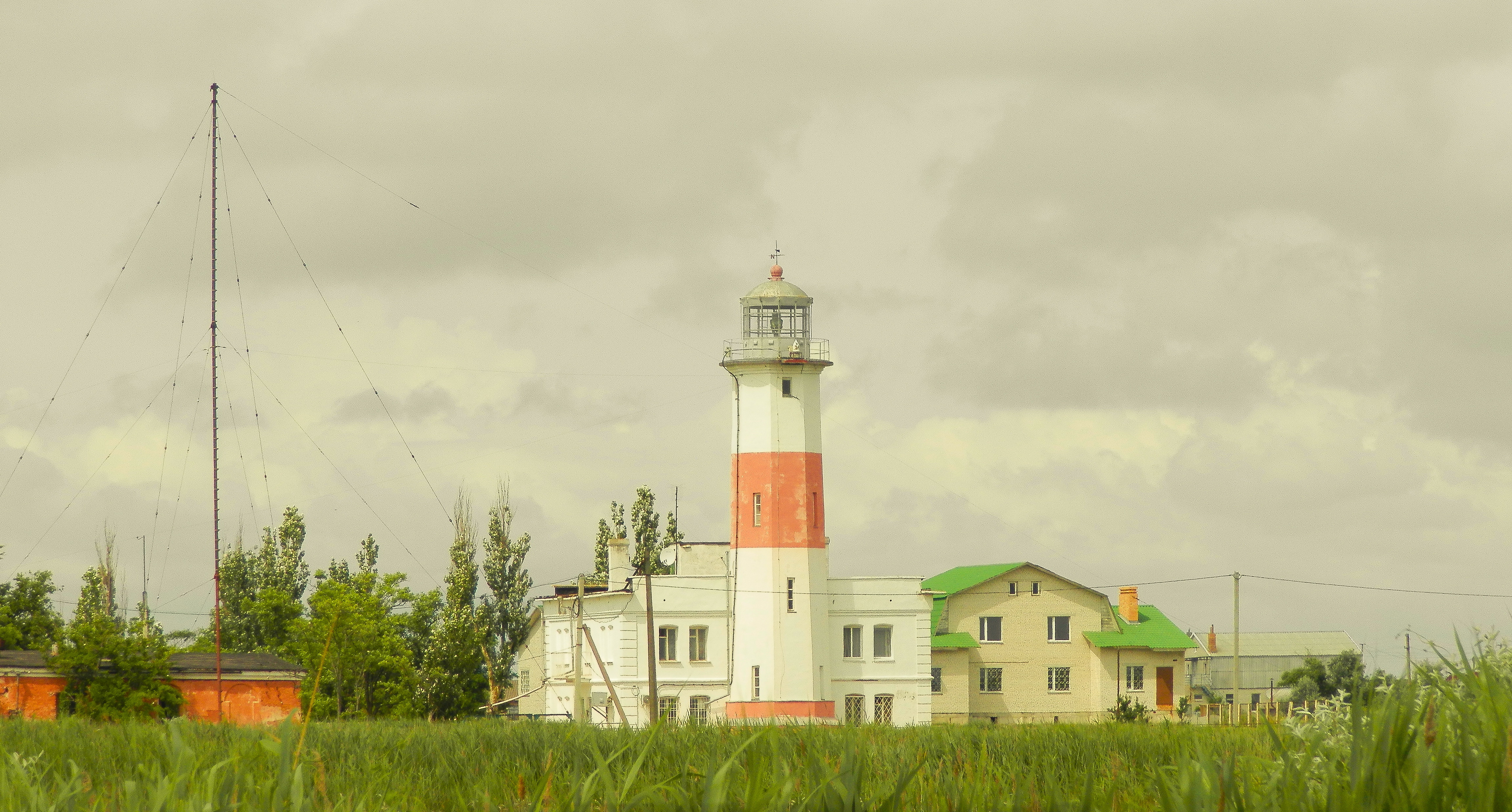 «Приазовський національний природний парк», Бердянський, Мелітопольський, Приазовський райони, міста Бердянськ та Мелітополь Нижний Бердянский маяк на Дальней Косе г. Бердянск — расположен на севере Азовского моря на южной оконечности Бердянской косы, в городе Бердянск Запорожской области Украины. Он указывает путь к Бердянскому порту, расположенному в глубине Бердянского залива. Нижний, Бердянский, маяк, Верхний, Бердянский, маяк, на Дальней Косе, г. Бердянск, Бердянские маяки, год основания, старый, когда построен, на Азмоле. Начато строительство 22 апреля 1838 года. В качестве источника света использовались керосиновые лампы. Здание маяка представляет собой восьмигранную каменную башню белого цвета с оранжевой полосой посередине. Высота маяка — 23 метра. С 1883 года в качестве источника света стали использоваться электрические лампы. Использовался аппарат системы Френеля III разряда. В 1889 году на маяке установили паровой гудок для подачи сигналов при плохой видимости — во время туманов и снега. 15 февраля 1911 года была проложена телефонная линия к маяку.